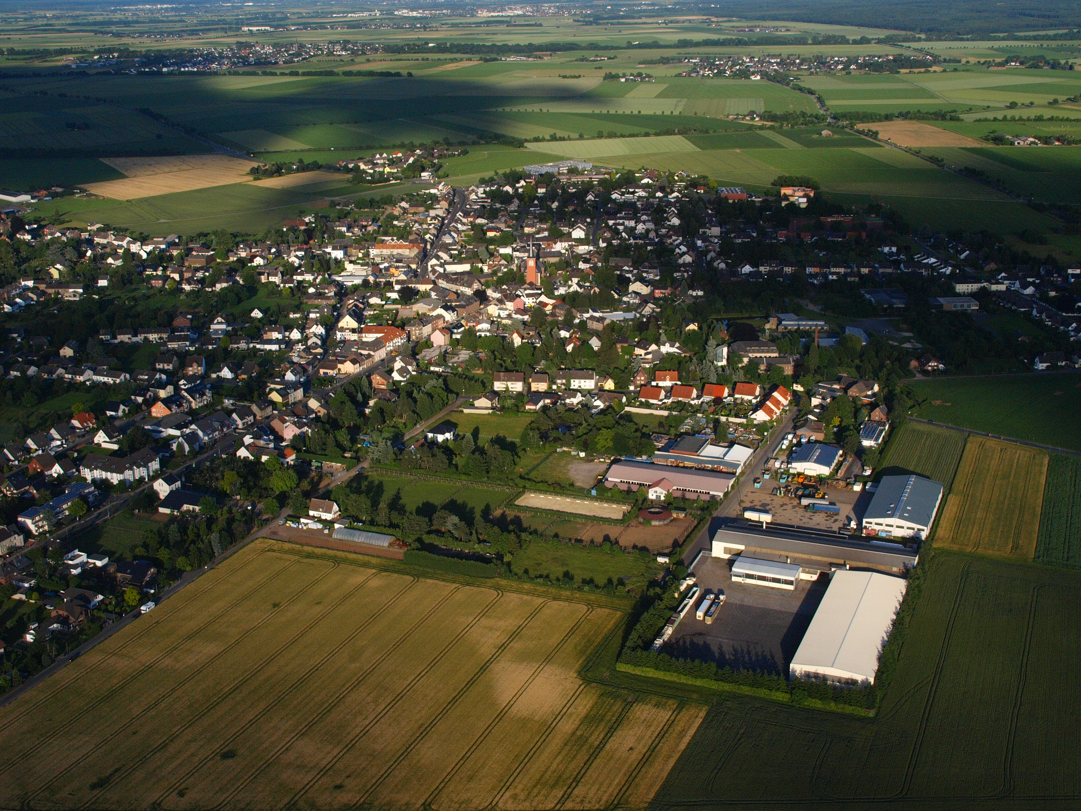 Euskirchen, Kuchenheim aus westlicher Richtung